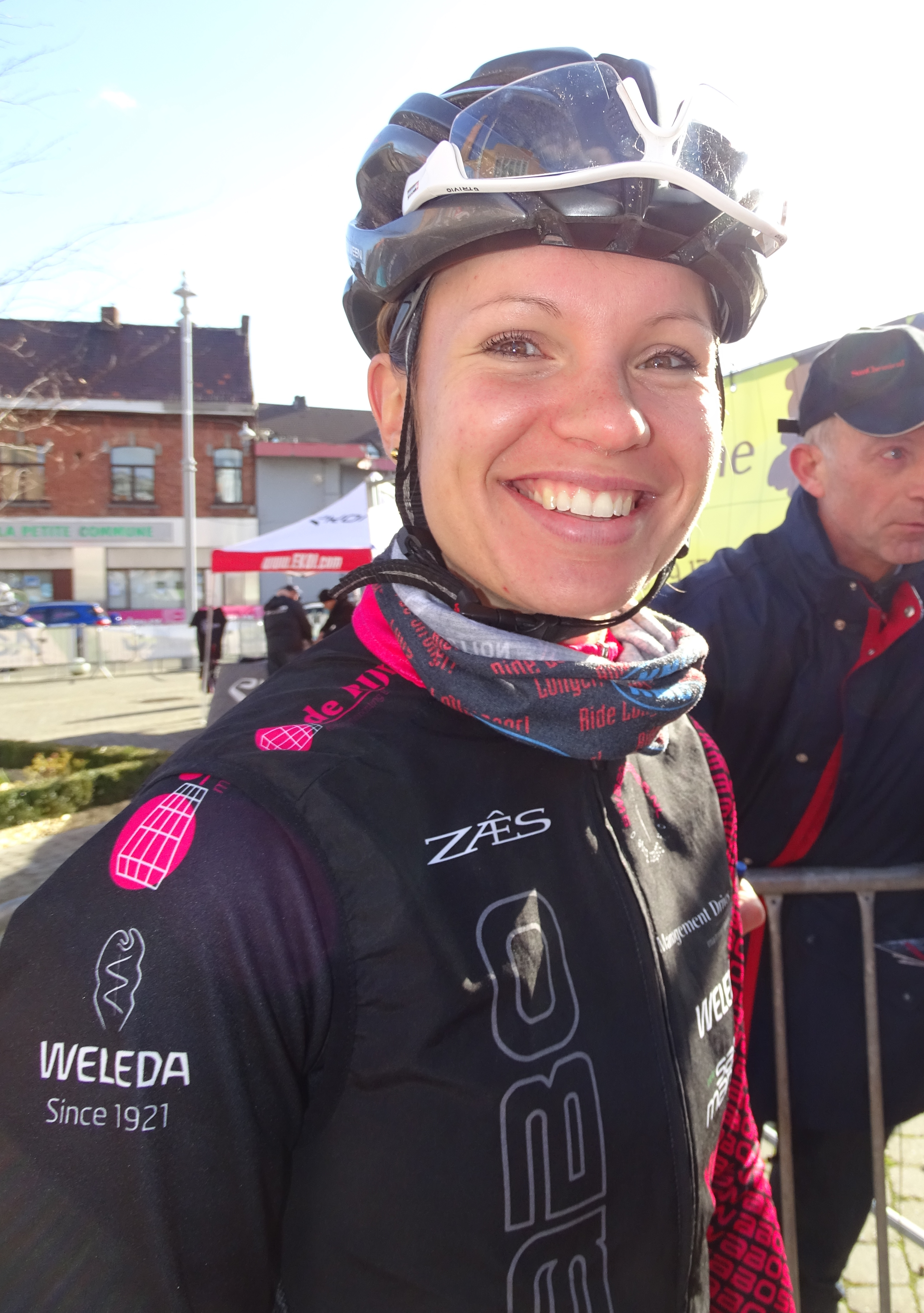 Reportage réalisé le mercredi 2 mars à l'occasion du départ du Samyn des Dames 2016 et du Samyn 2016 à Quaregnon, Belgique.